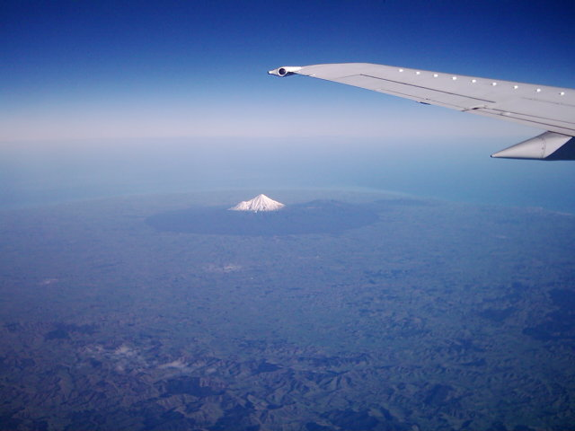 Mt Taranaki from plane